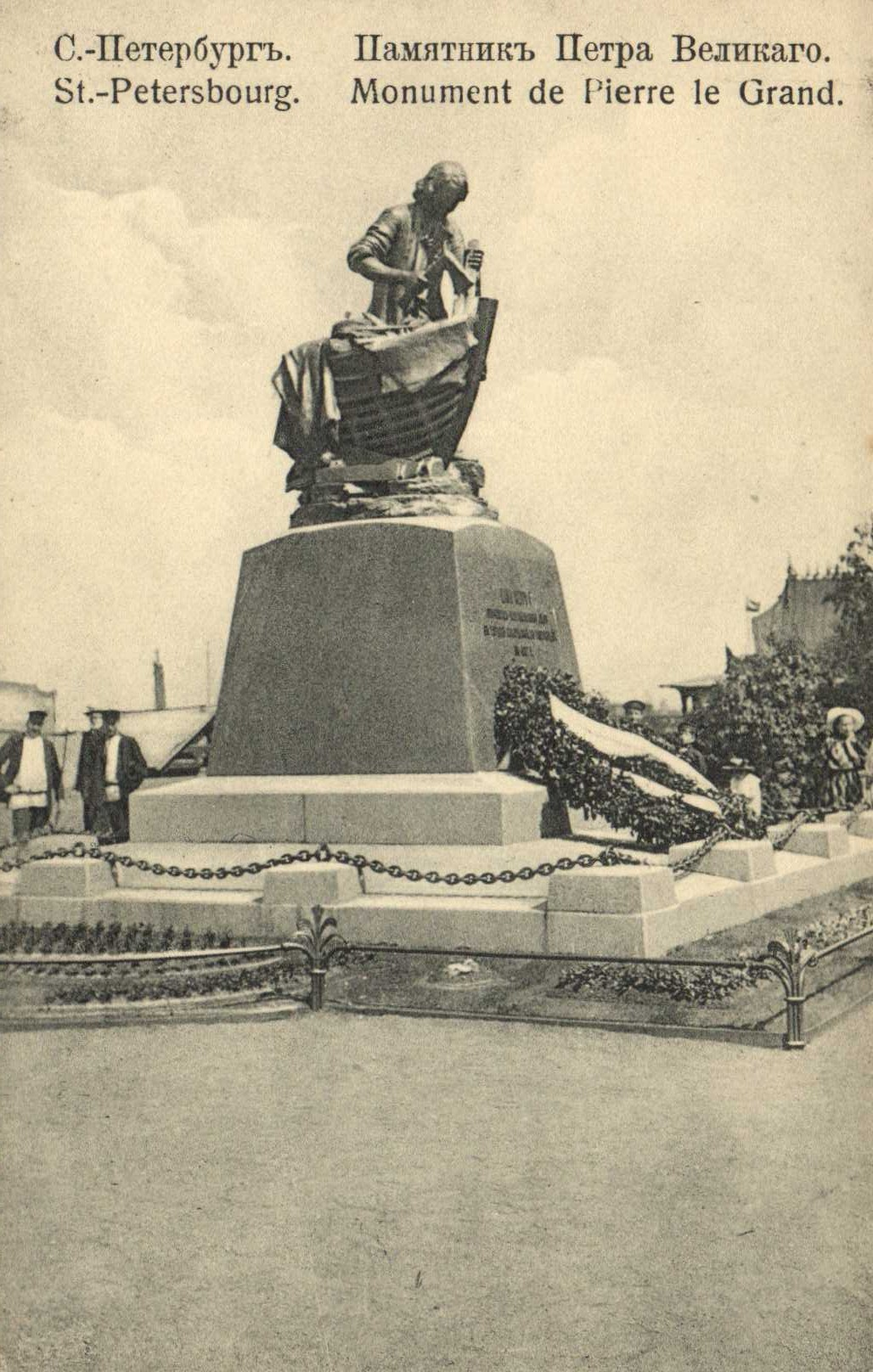 Царь-плотник.Памятник, стоявший на ДворцовоЙ набережной СПб.